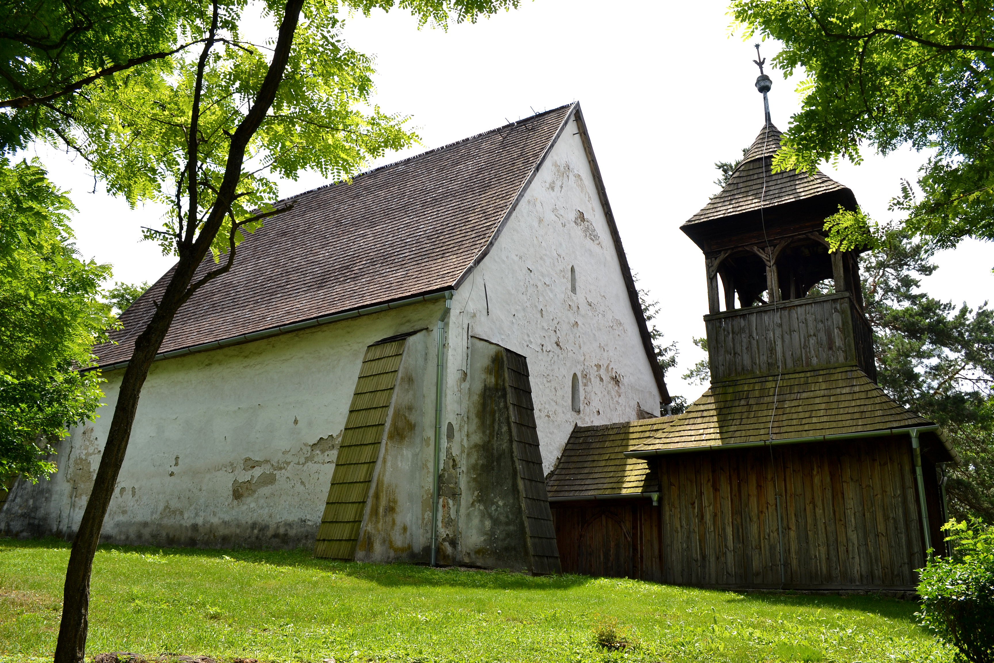 Žíp (okr. Rimavská Sobota), kostol Reformovanej kresťanskej cirkvi; celkový pohľad na areál